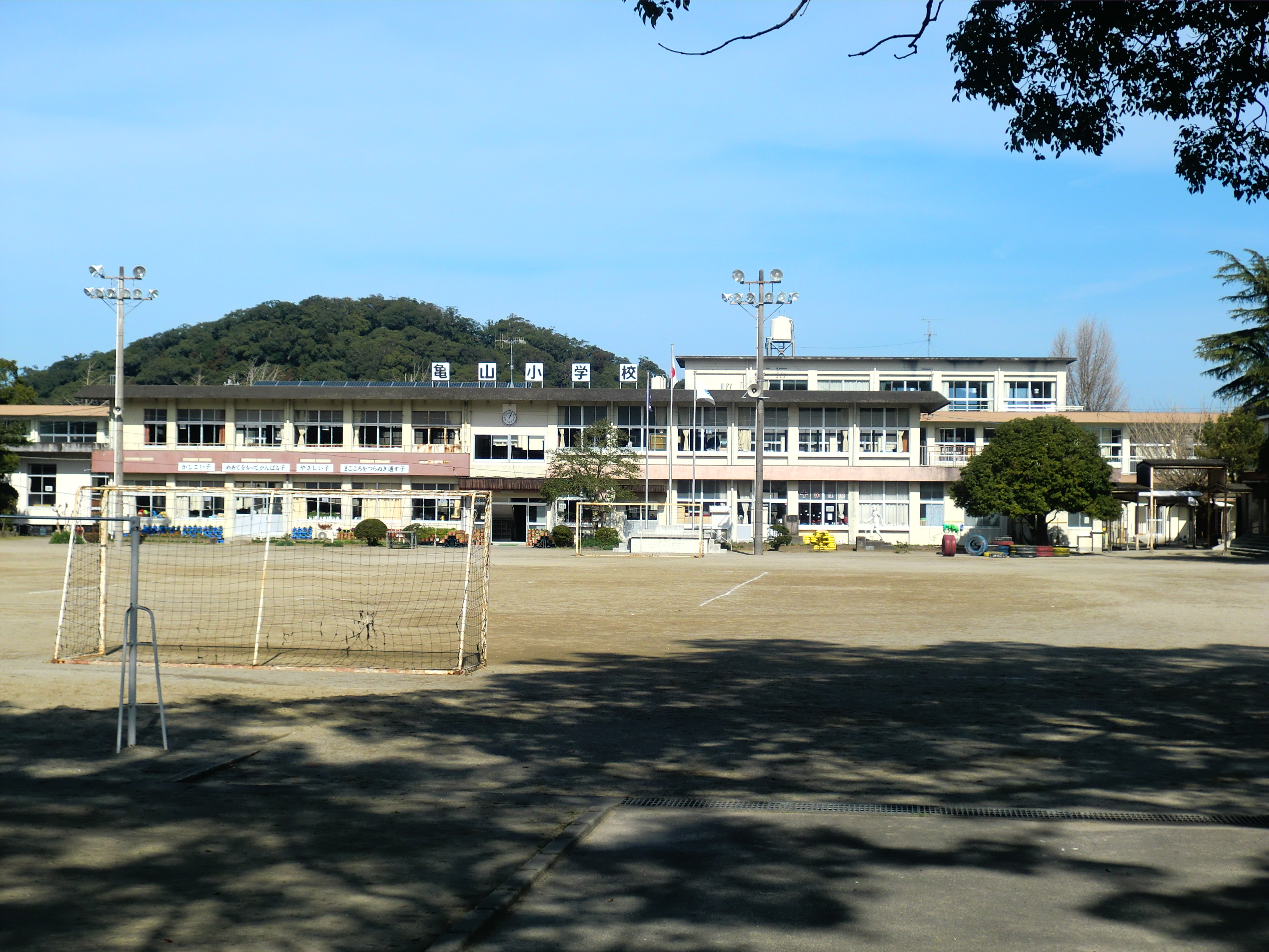 薩摩川内市にある薩摩川内市立亀山（かめやま）小学校